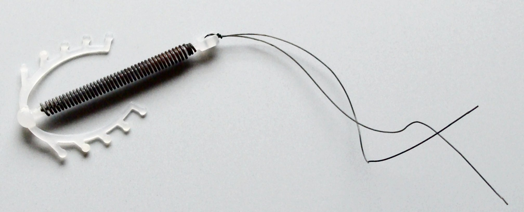 Multiload CU-250 Standard